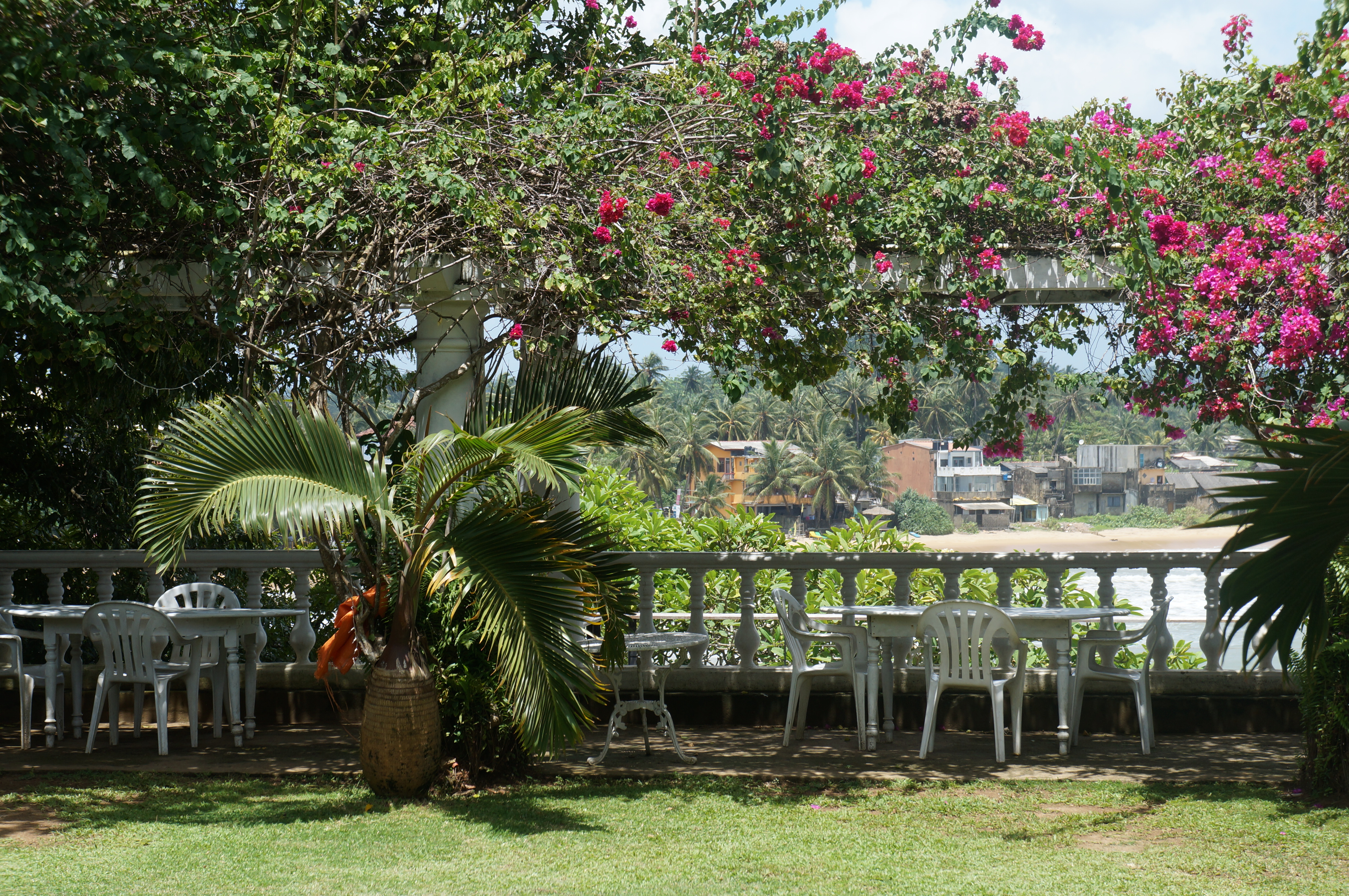 Les Terrasses de Closenberg Hotel Galle Sri Lanka.- Asie du Sud